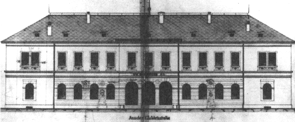 Schlossstraße (heutige Bolzstraße) in Stuttgart mit dem ersten Bahnhof (1846 erbaut von Karl Etzel).